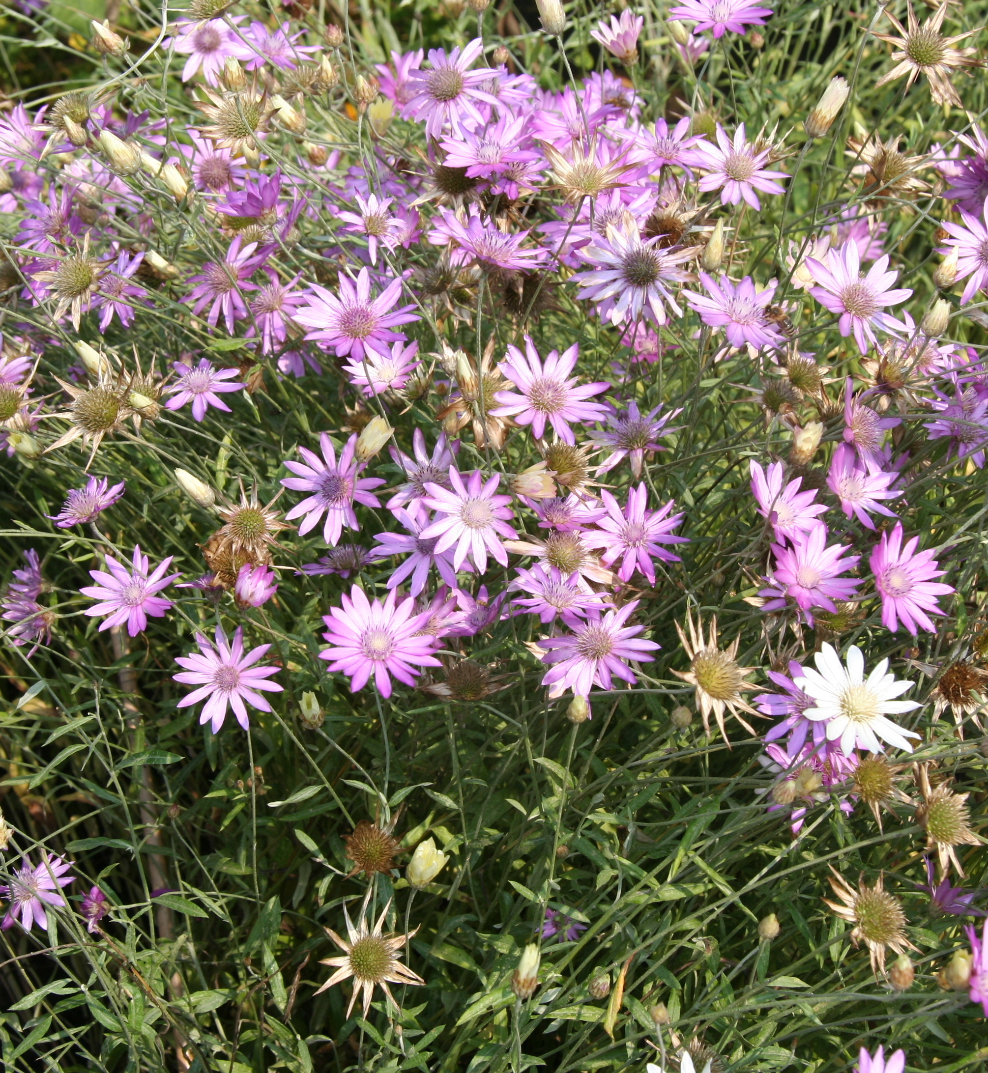 Xeranthemum annuum im Botanischen Garten Dresden